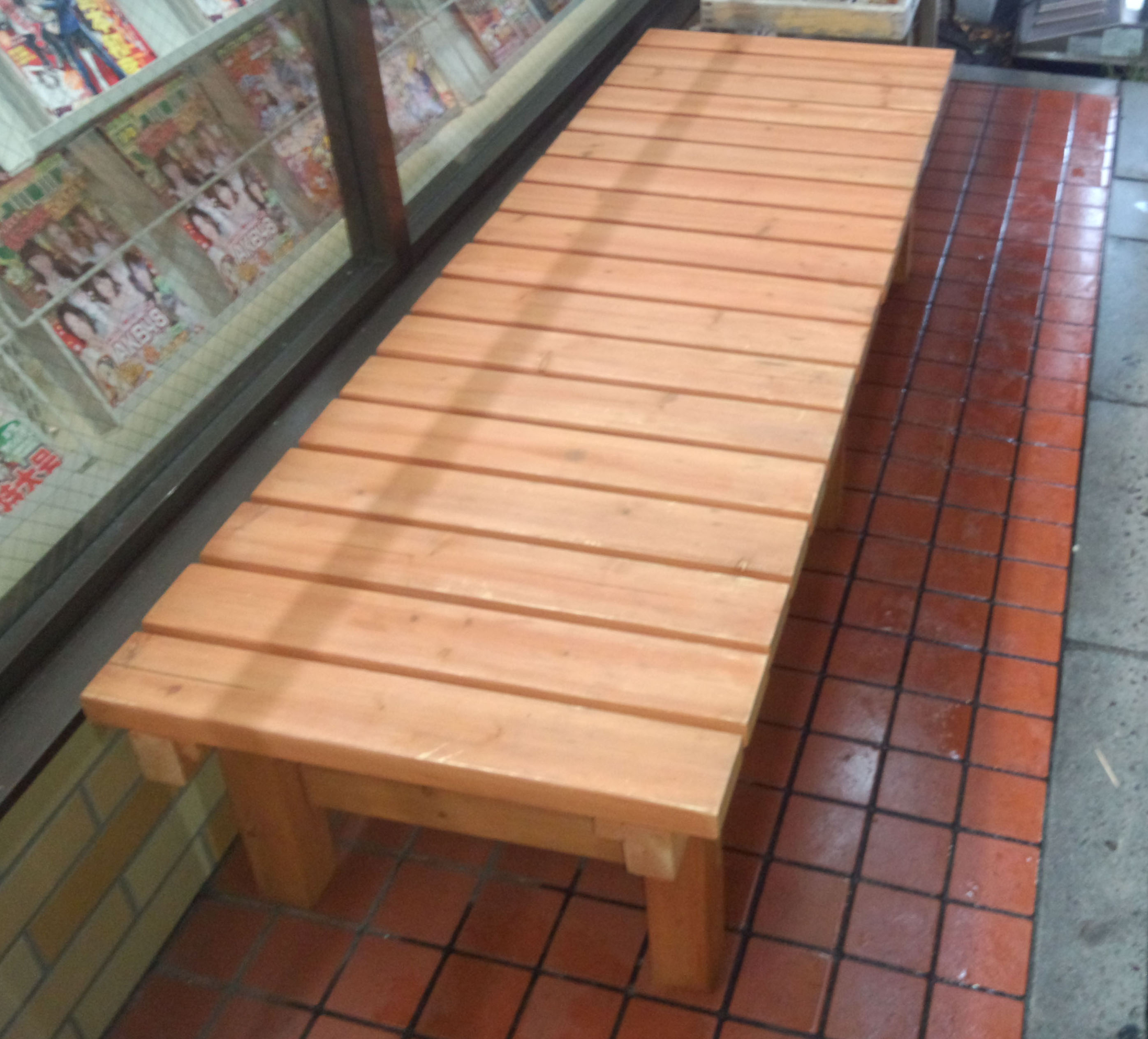 コンビニエンスストア前の縁台